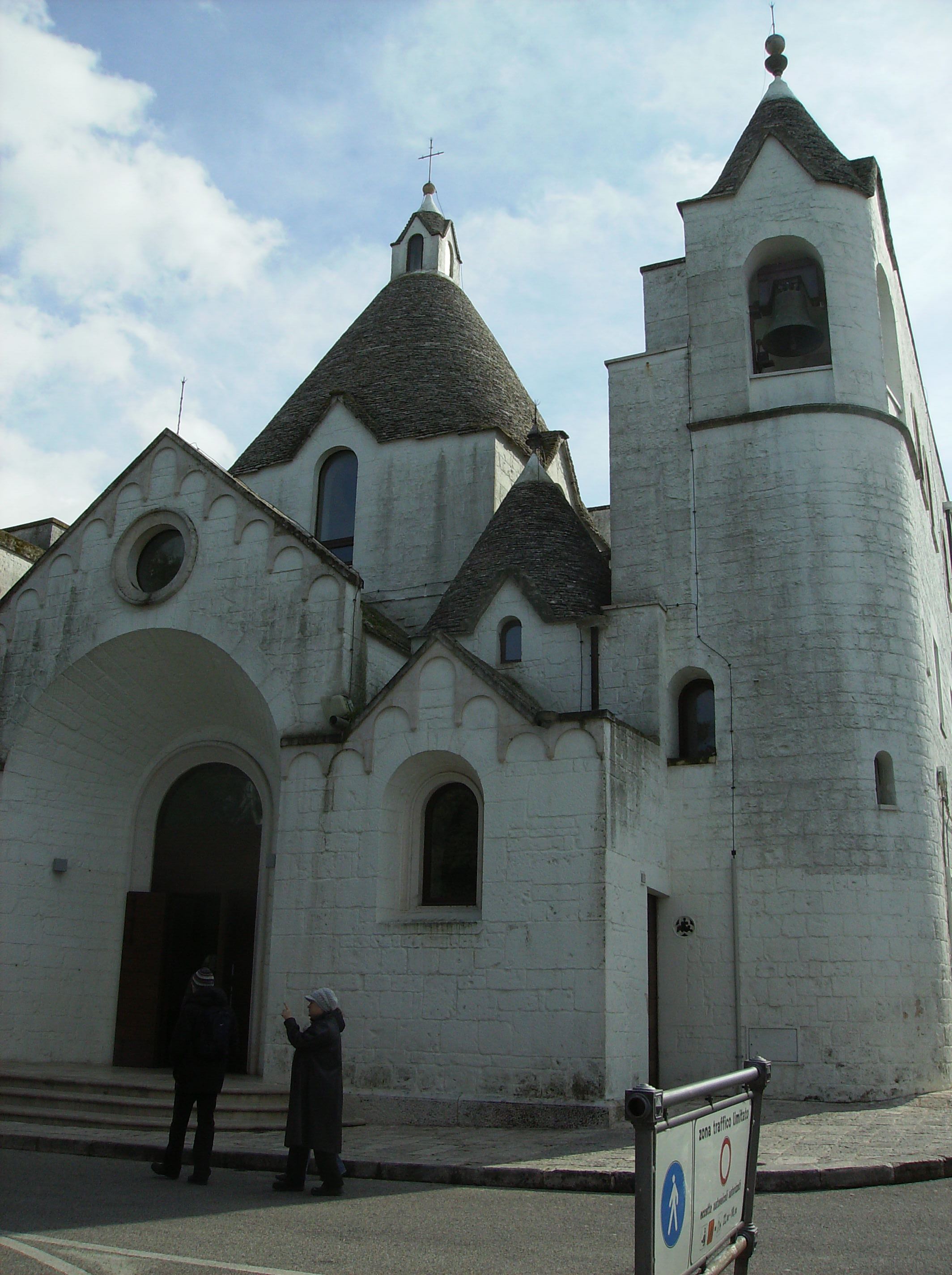 Alberobello - Italie- église S.Antonio en trulli